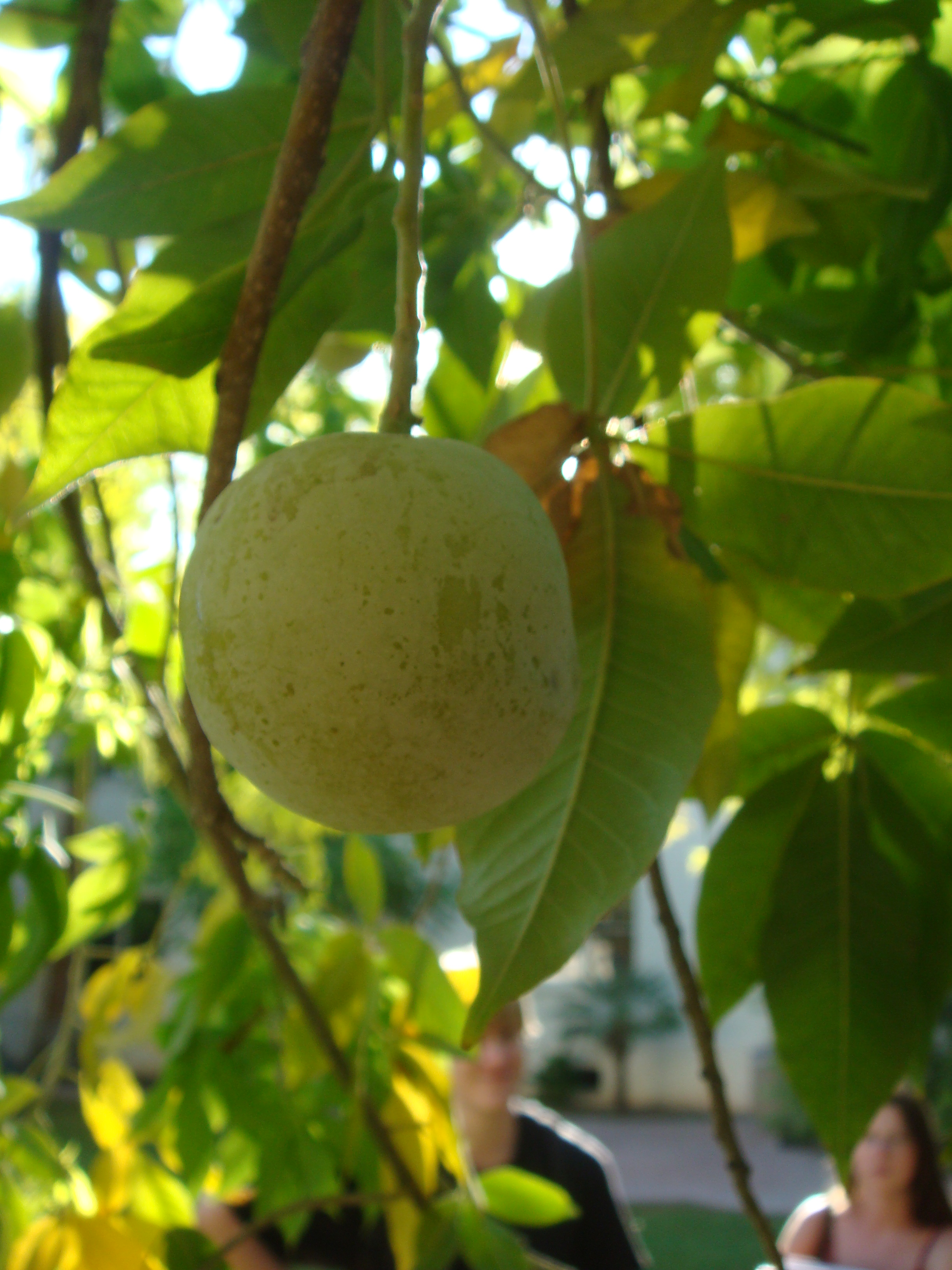 Casimiroa edulis, cultivated, Arizona State University, Tempe, Arizona (Secret Garden)